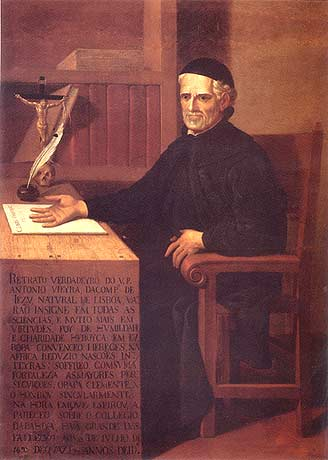 Óleo sobre tela, 1680 x 1280 mm. Casa Cadaval, Muge, Portugal. Obra de autor desconhecido com a efígie do célebre padre jesuíta, retratado num escritório, com o manuscrito da Clavis Prophetarum, obra deixada inédita e só publicada e traduzida em 2000. A legenda declara: «Retrato verdadeiro do Reverendo Padre António Vieira da Companhia de Jesus, natural de Lisboa , varão insigne em todas as ciências, e muito mais em virtude, foi de humildade e caridade heróica: em Roma convenceu hereges, na África reduziu nações inteiras, sofreu com suma fortaleza as maiores perseguições. O Papa Clemente X o honrou singularmente na hora em que expirou, apareceu sobre o Colégio da Baía, uma grande luz. Faleceu aos 4 de Julho de 1697 de quase 90 anos de Idade.»